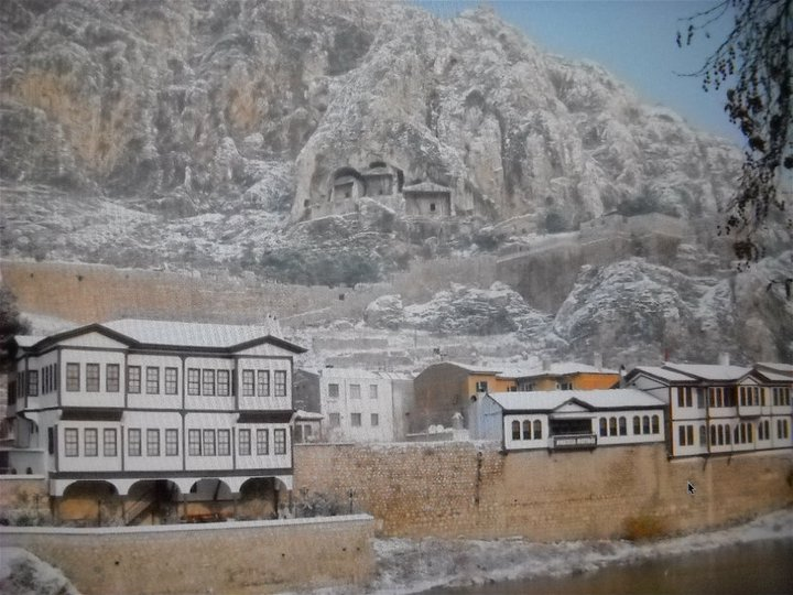 TUSLOG Detachment 3-2 kodlu Samsun Amerikan Radar Üssü'nün bir personelinin Amasya ziyareti sırasında çekilmiş Kral Kaya Mezarları ve tarihi evler fotoğrafı.